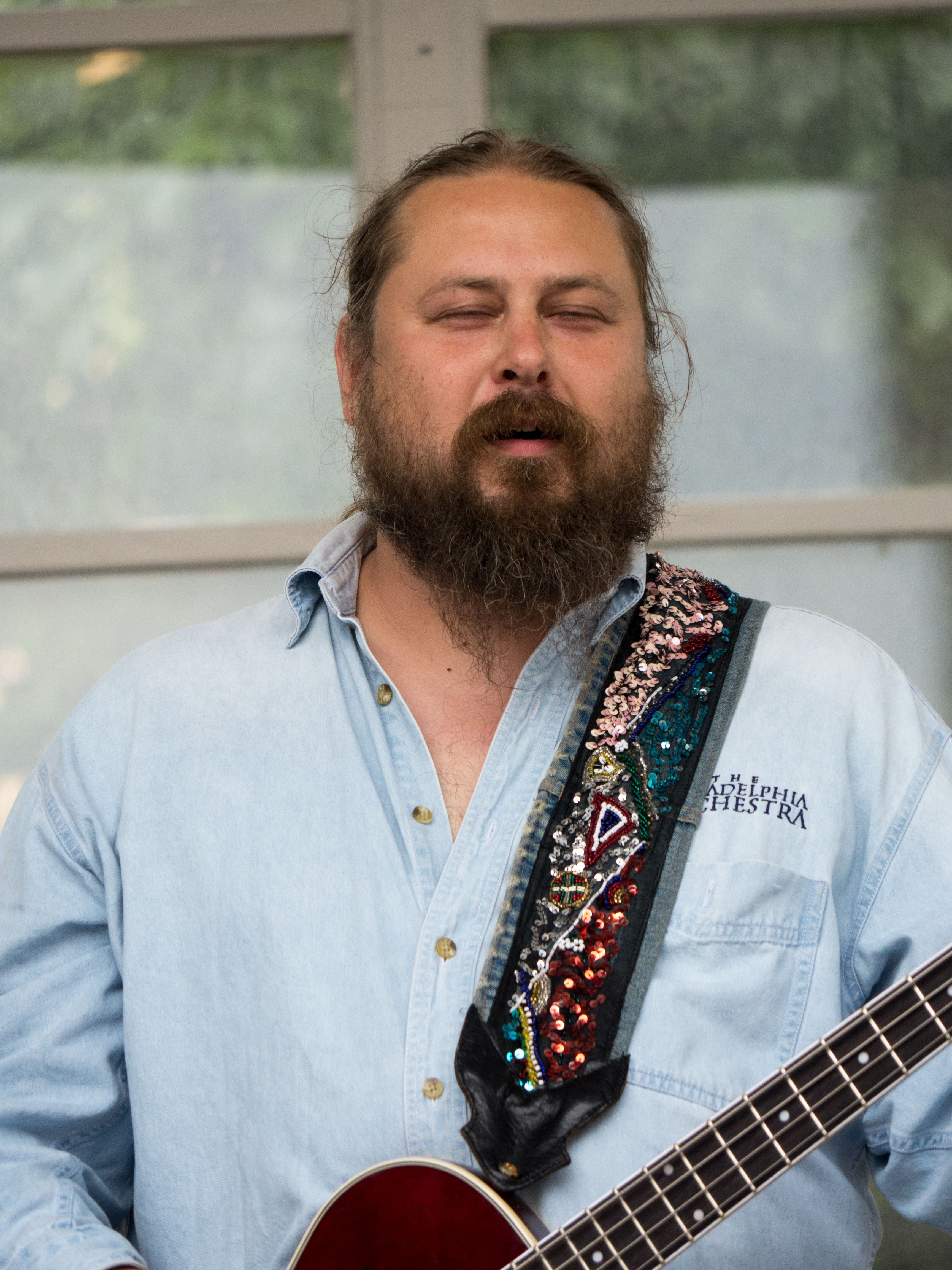 Jukka Jylli suomalainen basisti